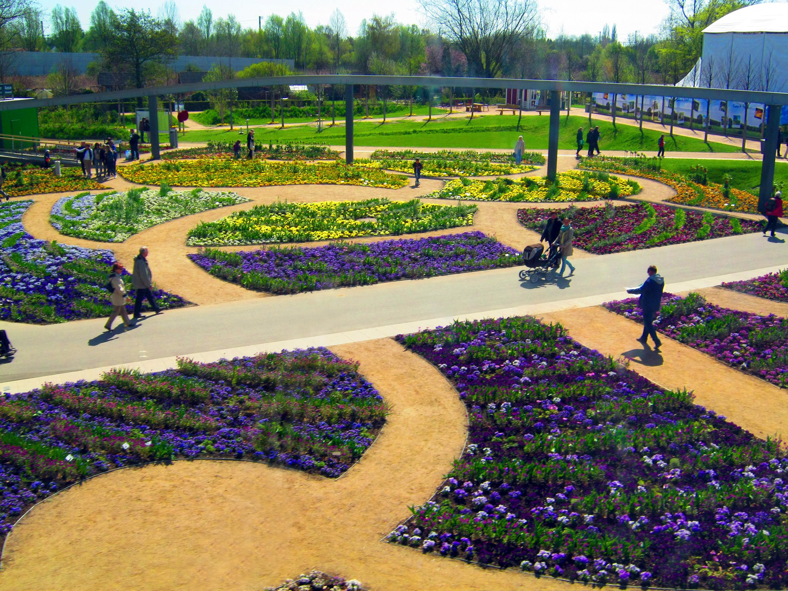 Blumenbeete auf der Internationalen Gartenschau Hamburg 2013 in Hamburg-Wilhelmsburg.